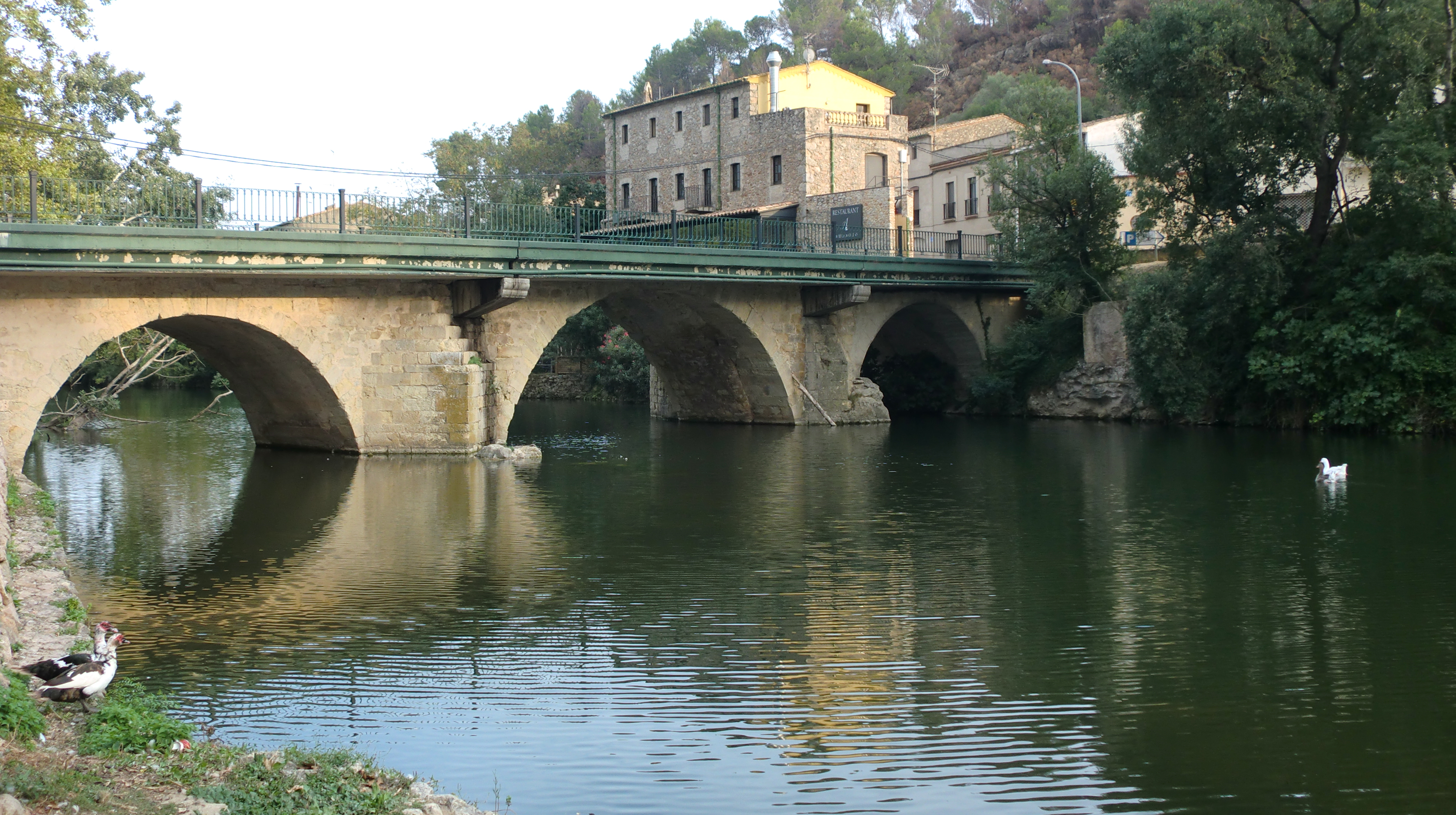 Pont Vell (Pont de Molins)